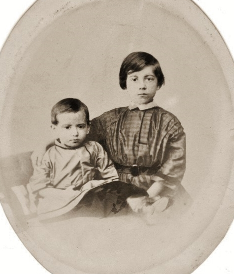 I figli di Černyševskij: Aleksandr Nikolaevič (1854-1915) e Michail Nikolaevič (1858-1924)